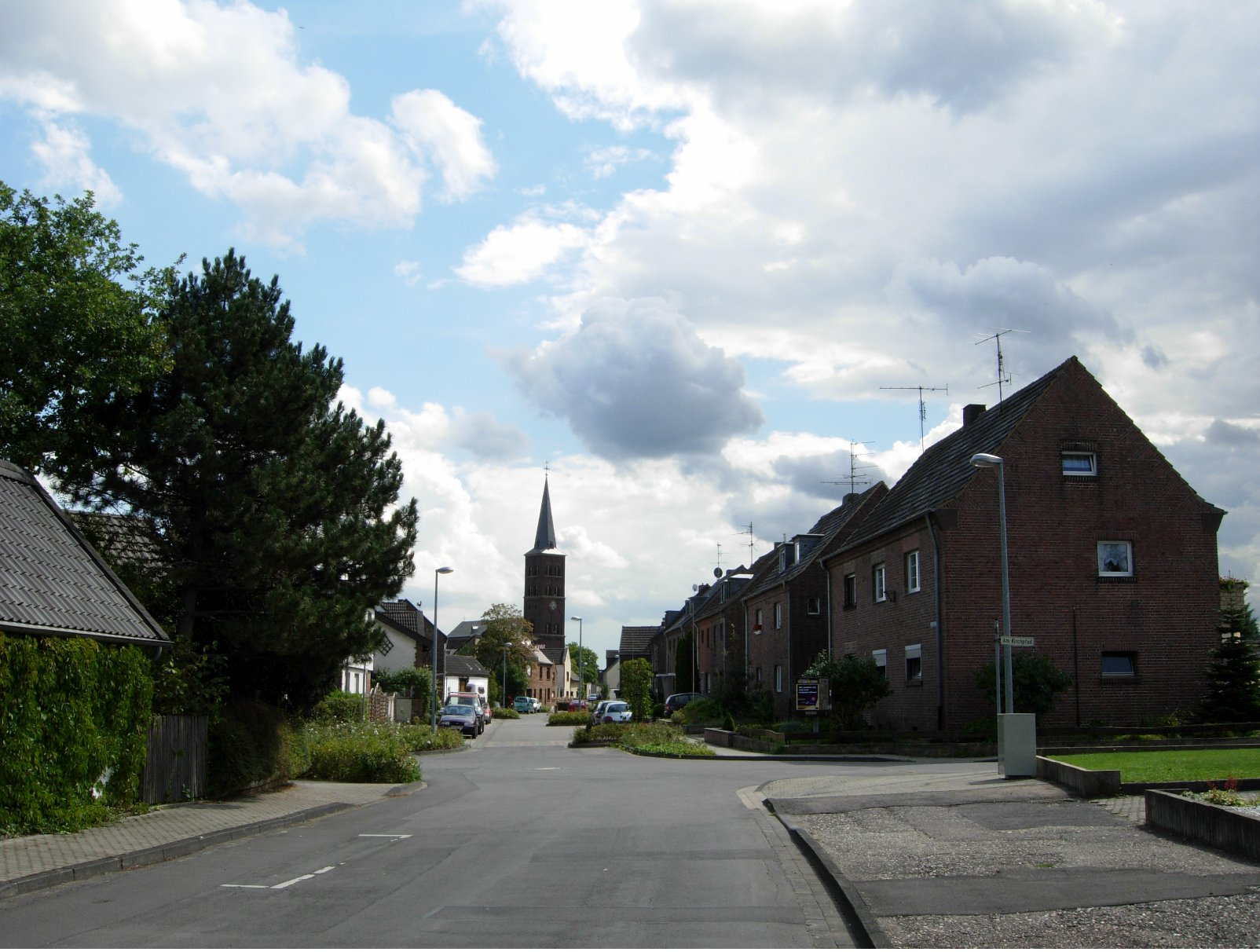 Lambertus-Kirche in Bliesheim (Erftstadt), von Nordwesten aus gesehen